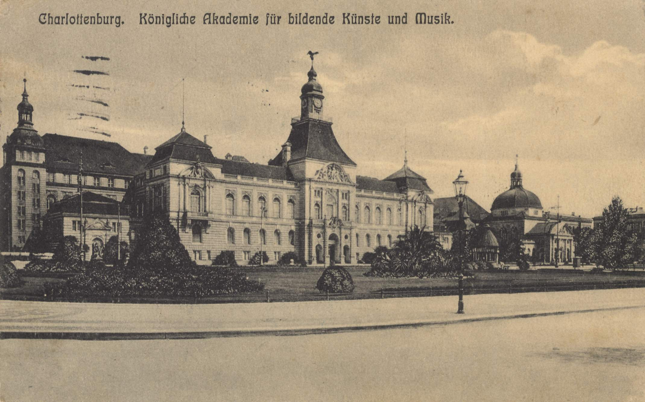 Königliche Akademie für bildende Künste und Musik (heute Universität der Künste) in der Hardenbergstraße in Charlottenburg